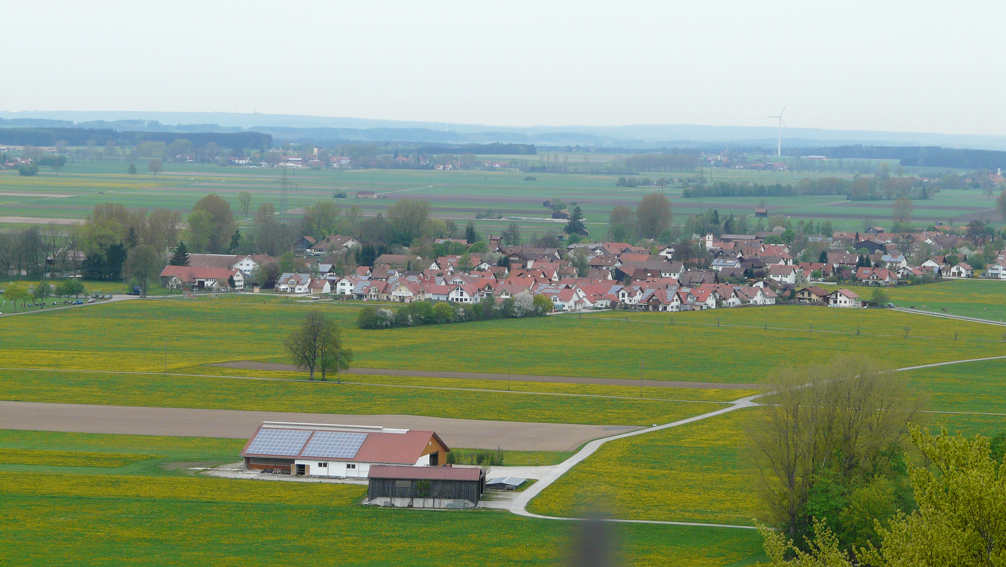 Blonhofen, Kaltental